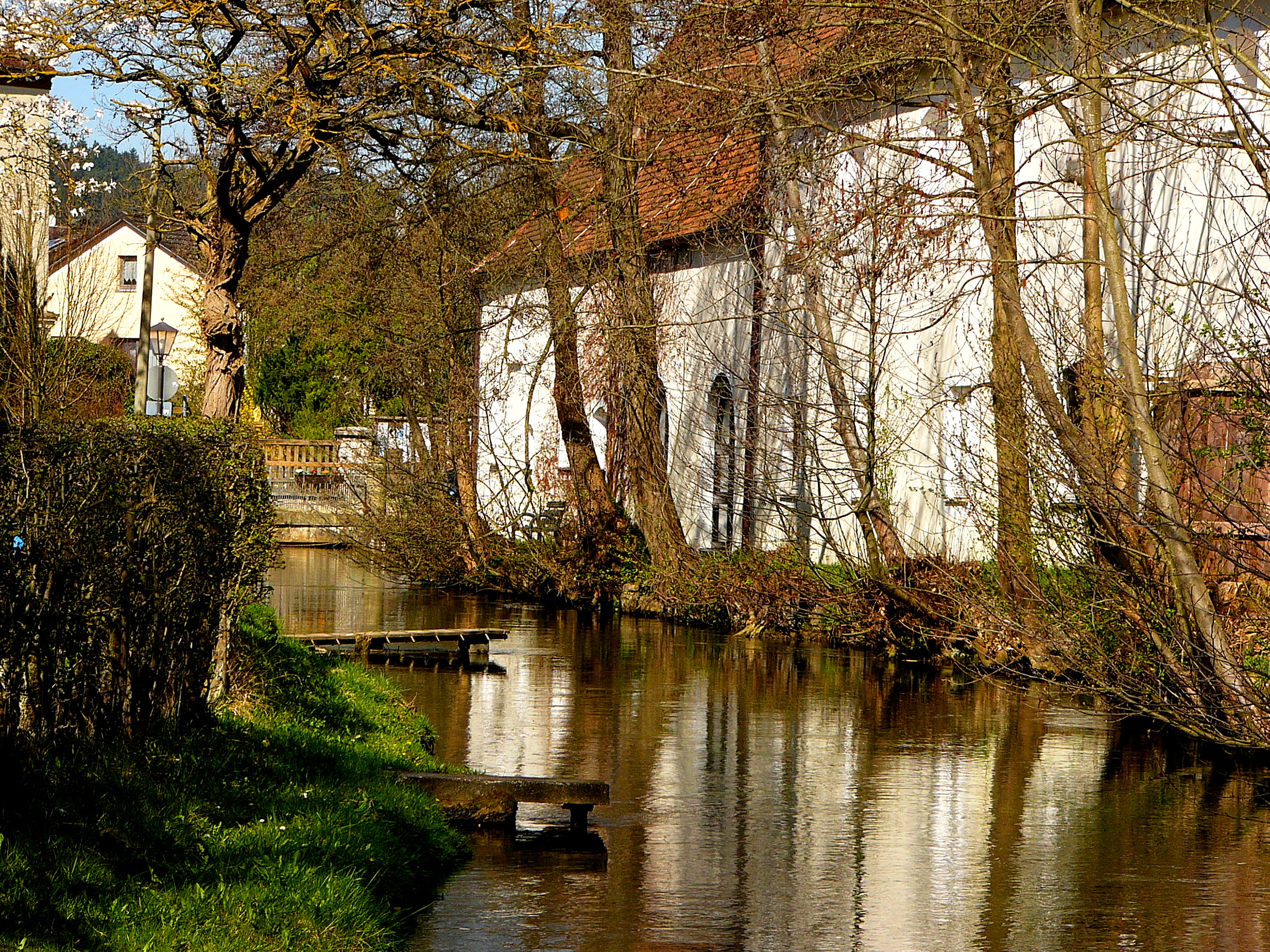 Die Stadtlaber, ein kurzer Arm der Breitenbrunnerlaber, fliesst an der Mauer des Franziskanerklosters entlang.